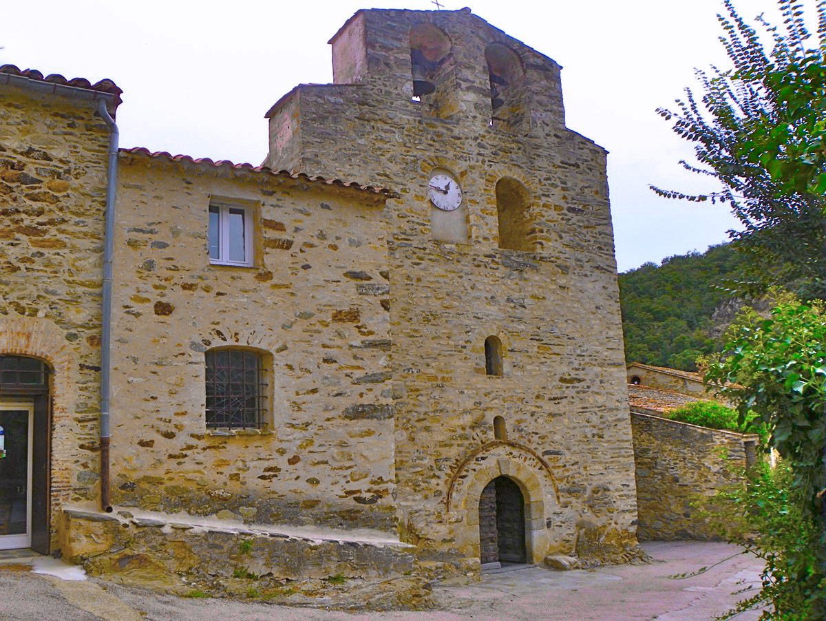 Façana de Sant Sadurní de Bula d'Amunt, al Rosselló